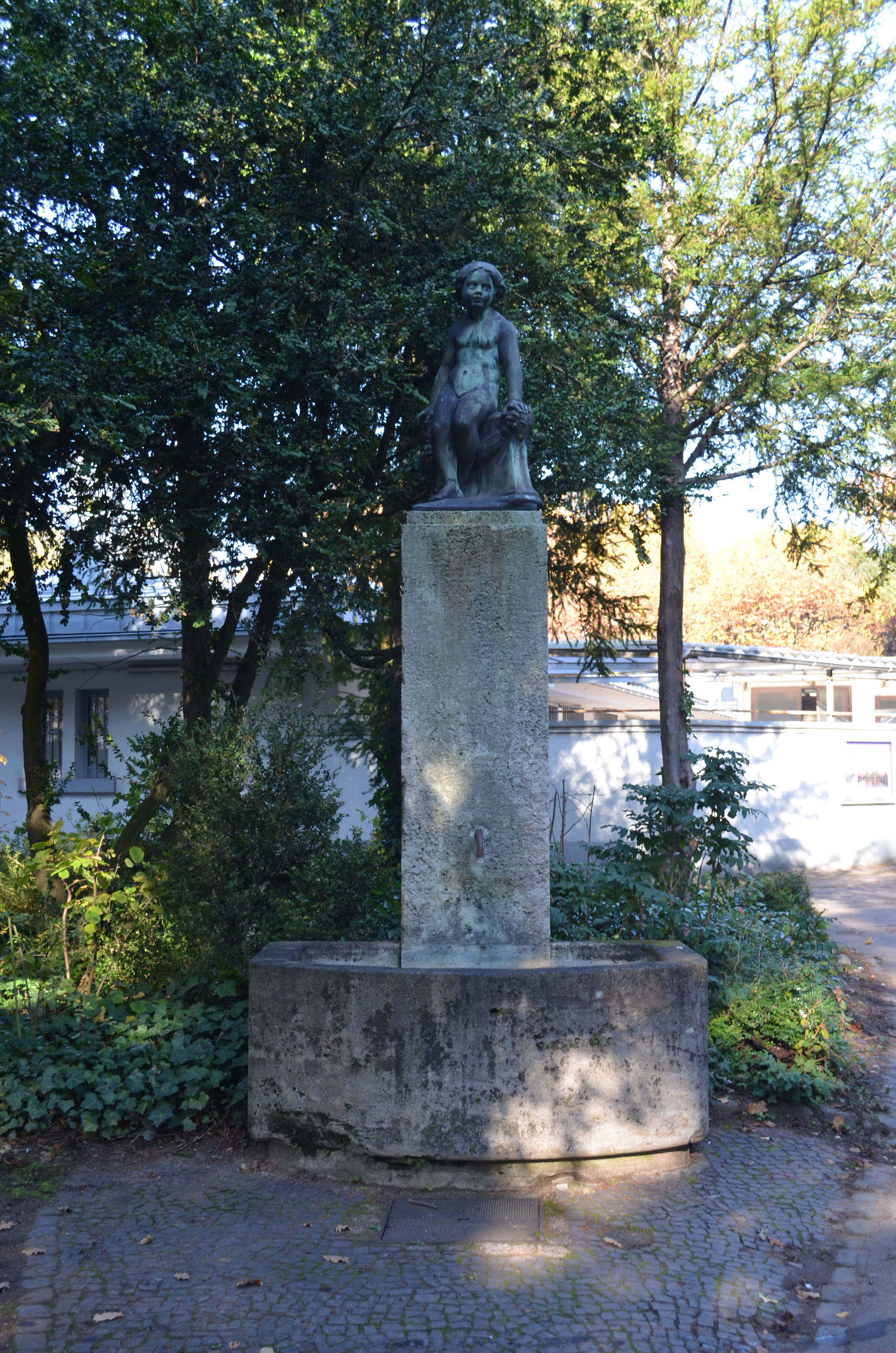 Frankfurt, Hauptfriedhof, Brunnen bei F 871